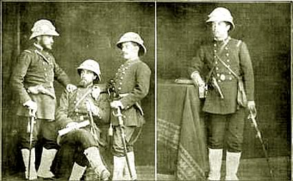 Oficiales del 3° de Línea. A la derecha Capitán Salvador Urrutia, que perteneció al 3° y al 6° de Línea. Segun la "Revista de Historia Militar, nr.12, 2013, pág. 33, En la primera campaña de Antofagasta y Tarapacá, los oficiales del Regimiento 3° de Línea utilizaron el Salacot o cucalón de corcho, modelo inglés, con las polainas blancas fabricadas en Francia, cuyos botones tenían estampados “Habillements Militaires”, que significaba vestimentas militares.